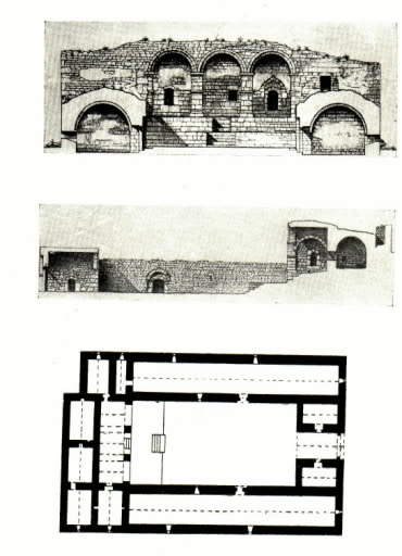 Qarğabazar karvansarasının planı və kəsiyi